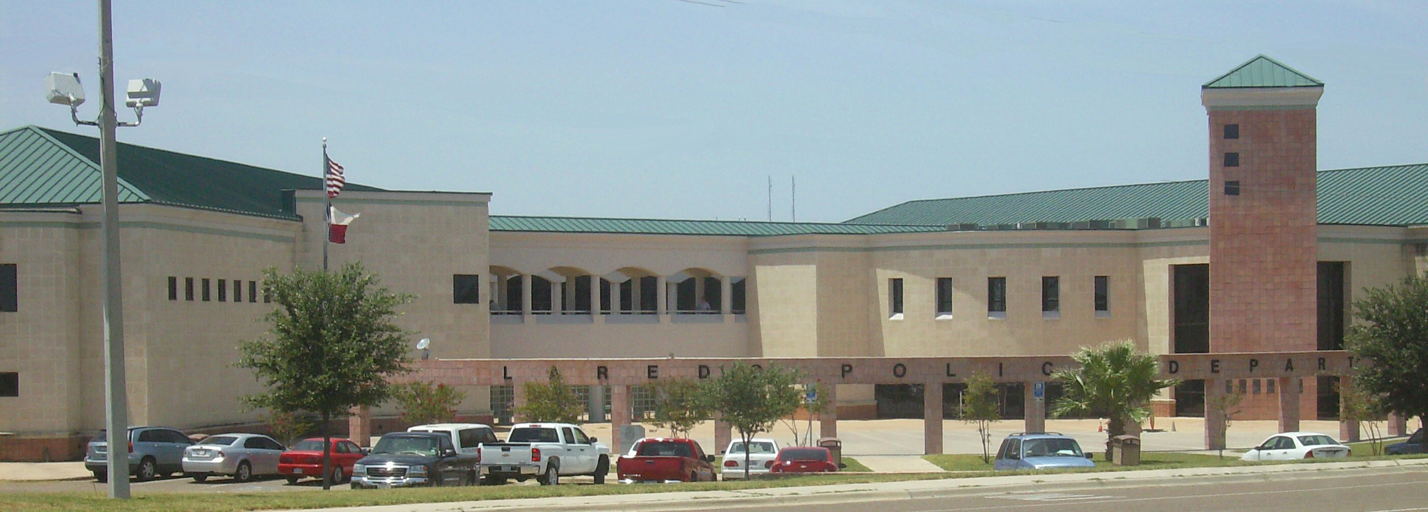 Laredo Police Department